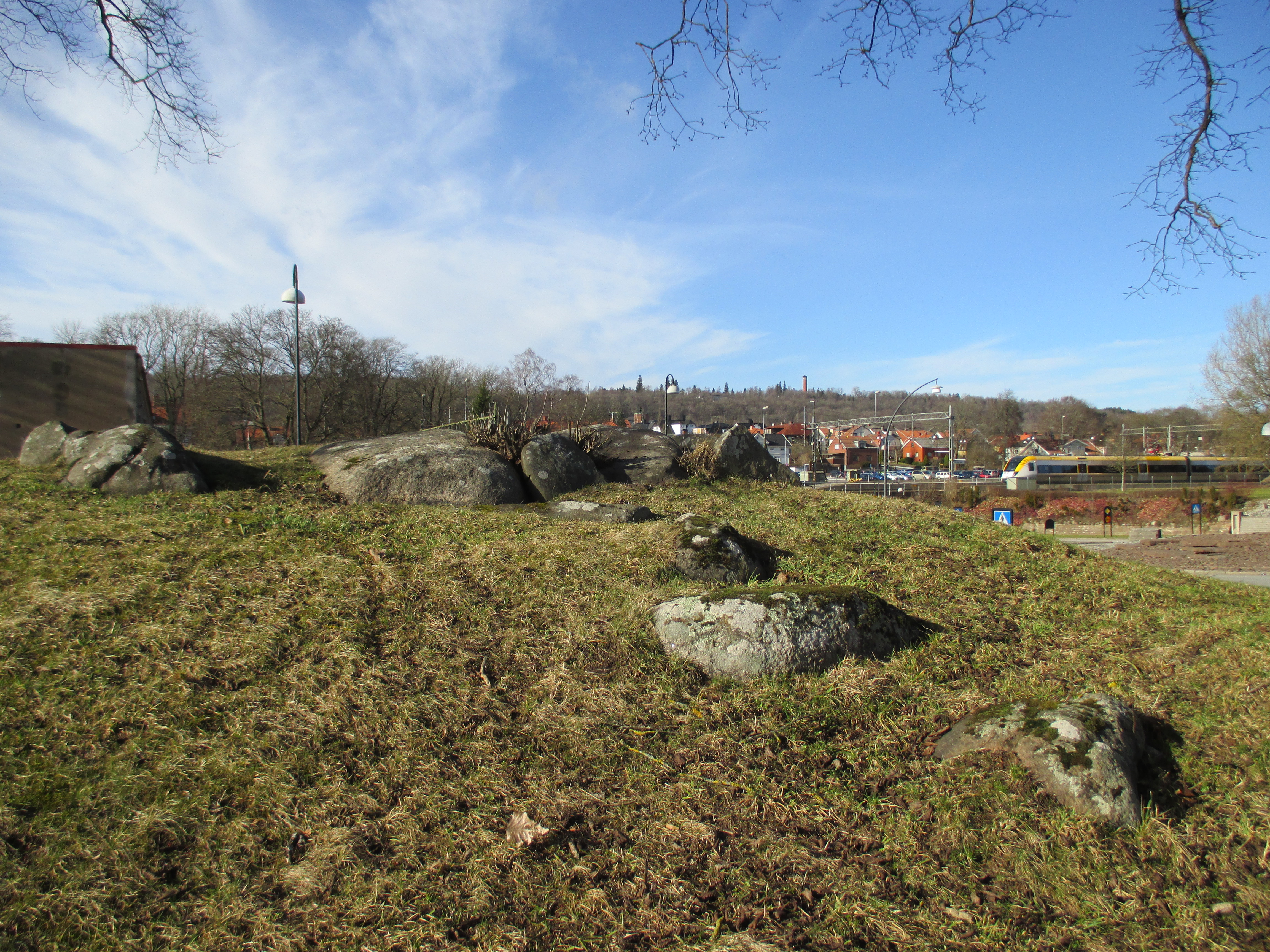 Lusthushögens gånggrift (RAÄ-nr Falköping 19:1) på Ranten i Falköping, Falköpings kommun, f.d. Skaraborgs län, Västergötland, Västra Götalands län, Sverige.